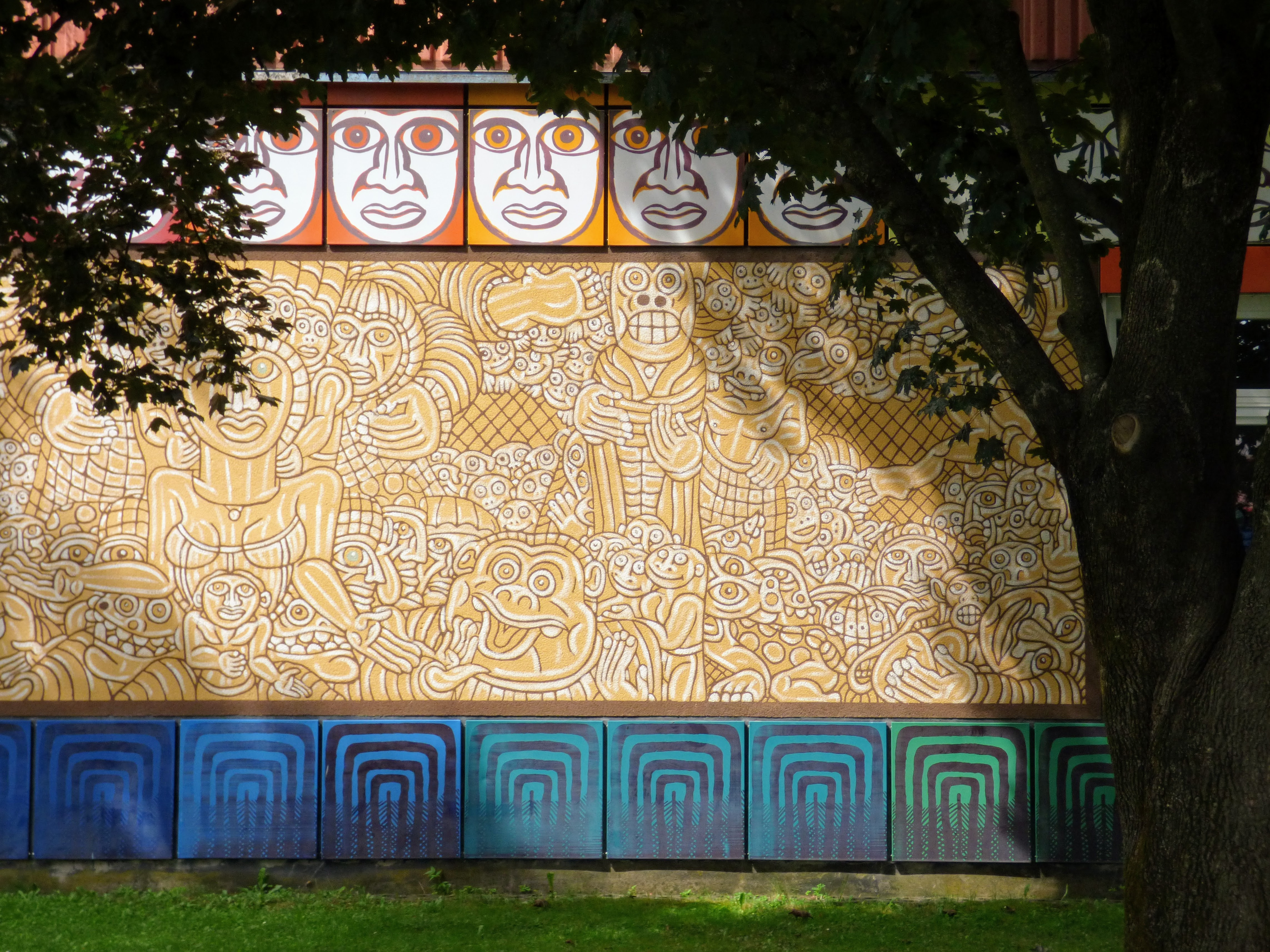 Hauptschule Bärnbach Fassade gestaltet von Robert Zeppel-Sperl